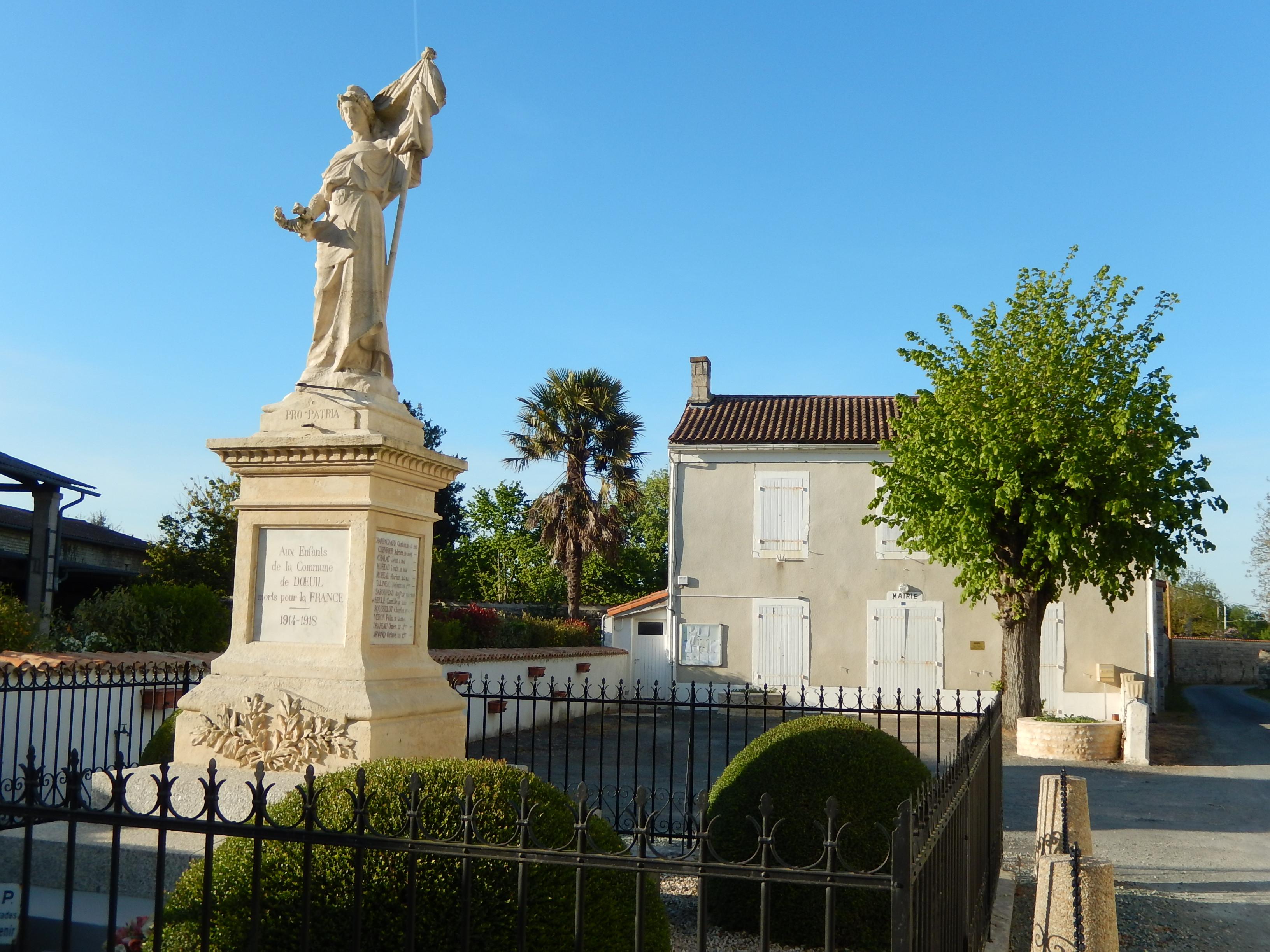 Le monument aux morts (au premier plan) et la mairie (au second plan) de Dœuil sur le Mignon (Charente-Maritime, France).